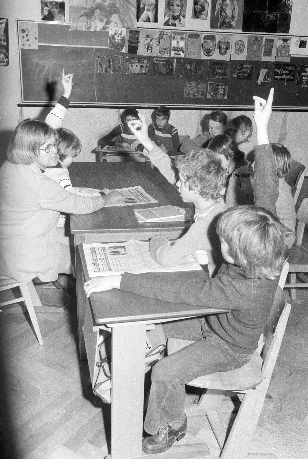 Im Rahmen eines Schulversuchs diskutieren 15 Sonderschüler einer 6. Klasse täglich eine Stunde das aktuelle Zeitgeschehen anhand der Kieler Nachrichten (KN).